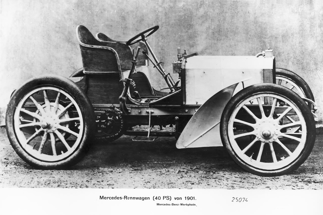 第一輛Mercedes汽車：DMG出品，由威廉·梅巴赫製作，並且由埃米爾·耶里內克駕駛參加了法國「尼斯週」賽車活動且大獲全勝的35匹馬力賽車，是第一輛懸掛梅赫西迪品牌的汽車產品，也是梅巴赫在DMG時代最經典的作品。